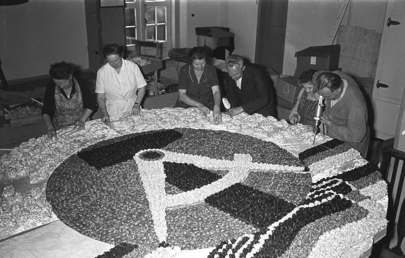 VEB Kunstblume Sebnitz, Staatswappen der DDR Zentralbild/Thomas 2.10.1959 10 Jahre DDR Staatswappen der DDR aus 20000 roten Samtröschen In freiwilliger Arbeit fertigen Beschäftigte des VEB Kunstblume Sebnitz für das Kulturhaus der Wismutkumpel in Karl-Marx-Stadt aus 20000 roten Samtröschen ein Staatswappen der DDR an.